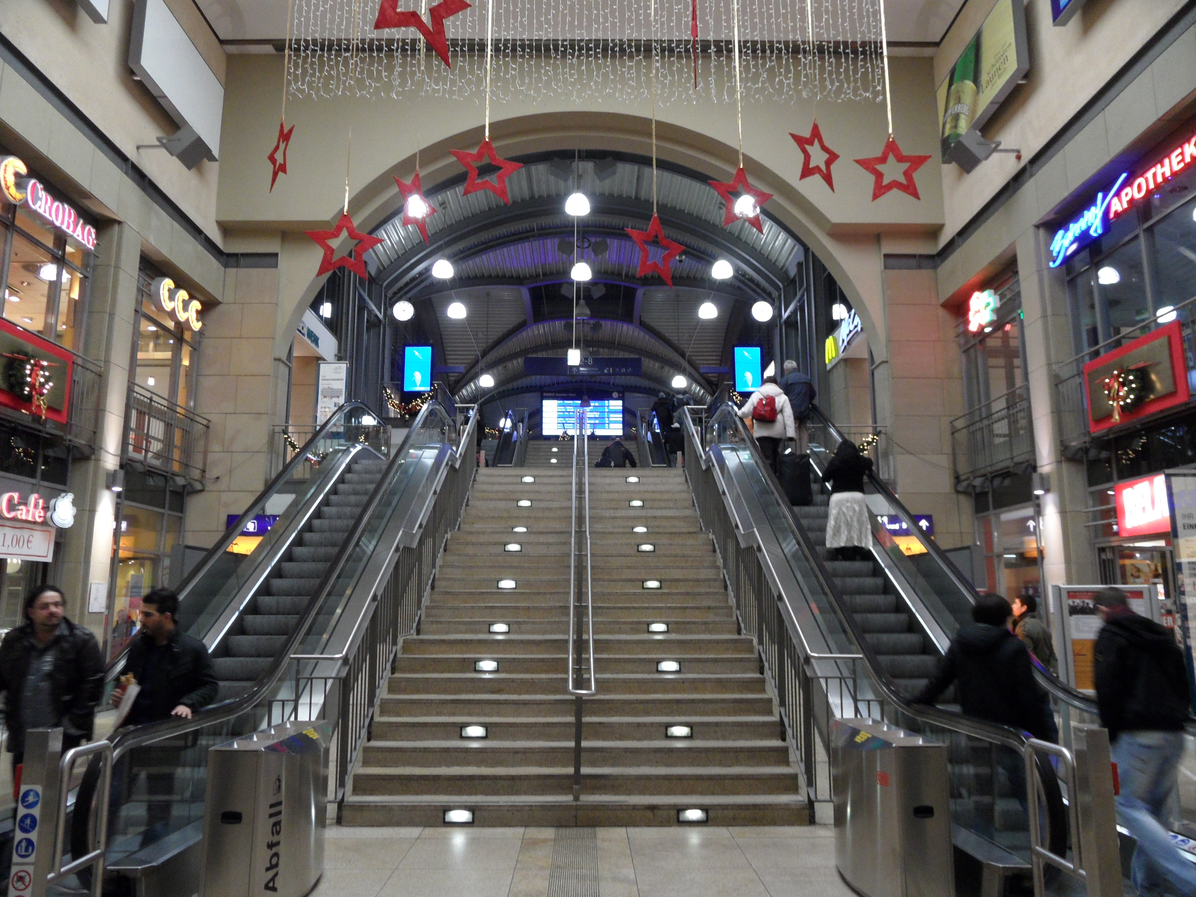 Mainz - Hauptbahnhof